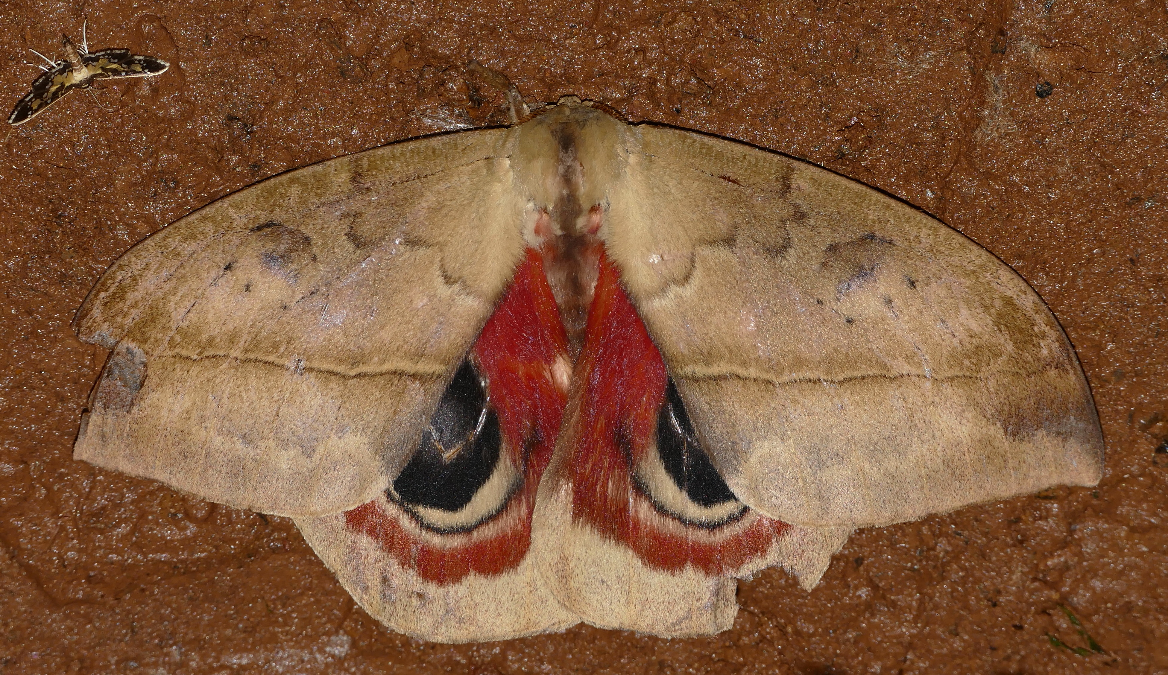 Piste de Belizon, Roura, French Guyana, FRANCE